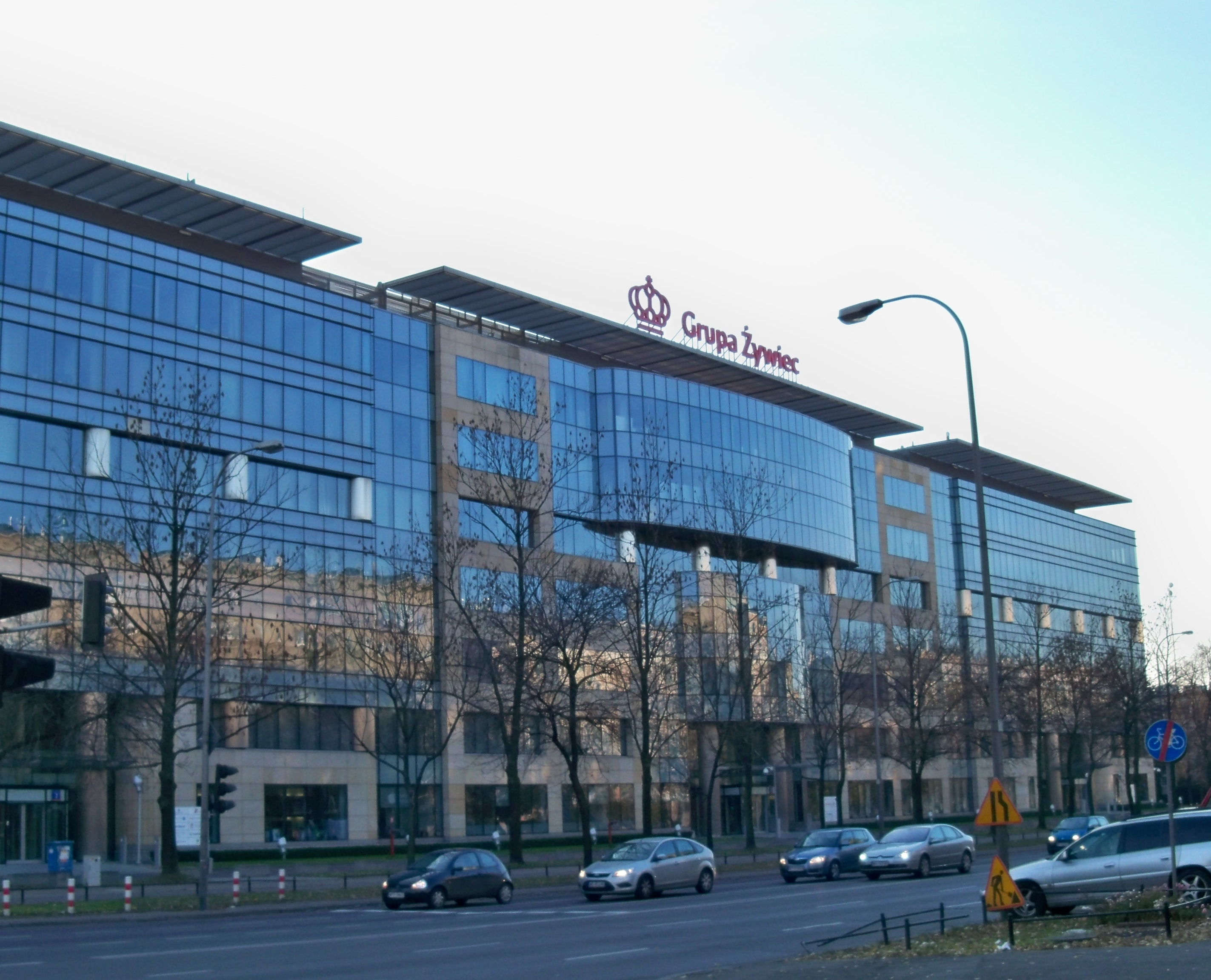 Biuro Grupy Żywiec SA. Ul. Bitwy Warszawskiej 1920 r. w Warszawie.